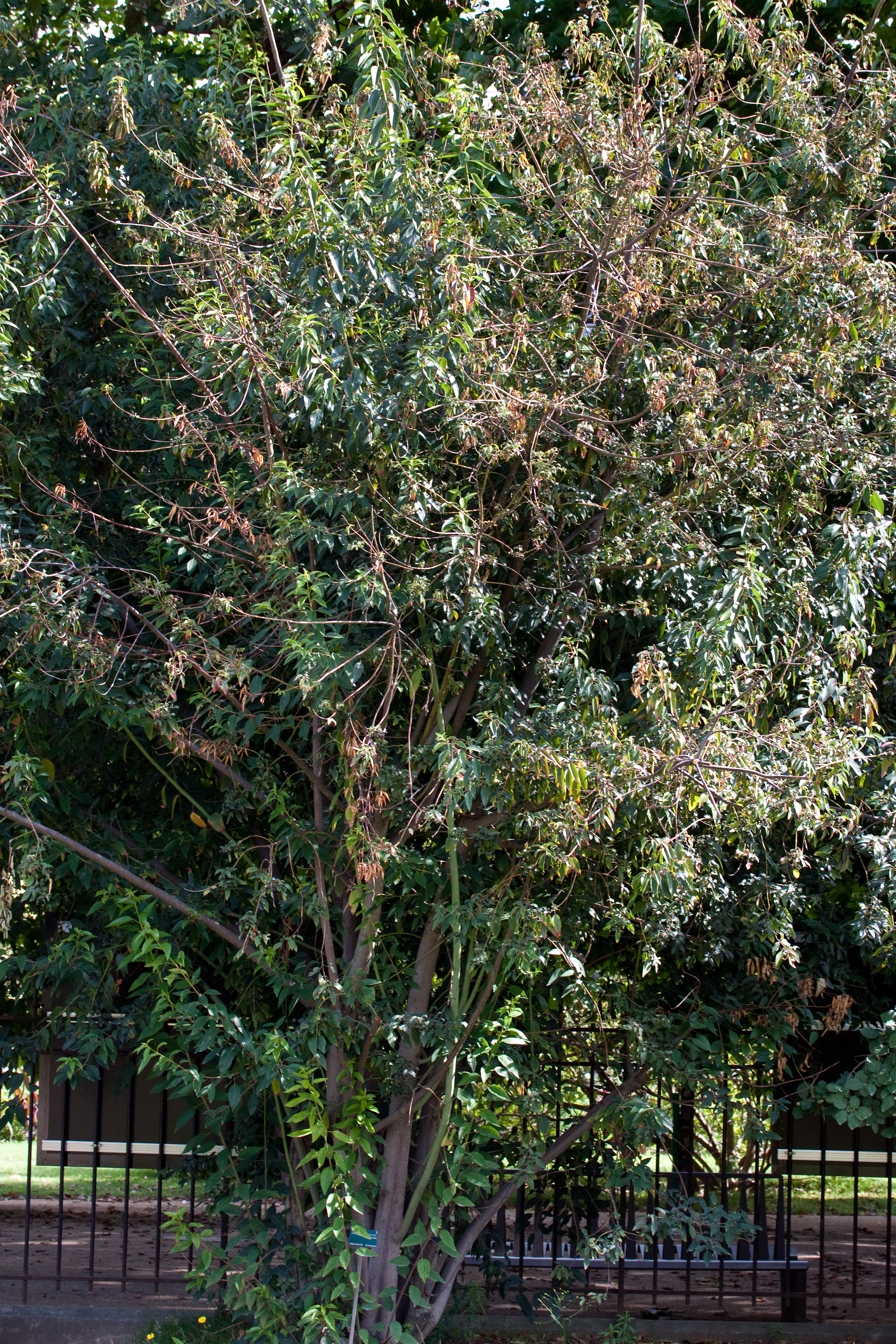 Aristotelia chilensis - Jardin des Plantes - Paris